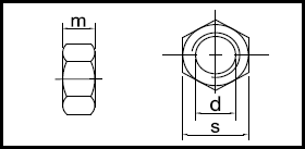 ISO 4032